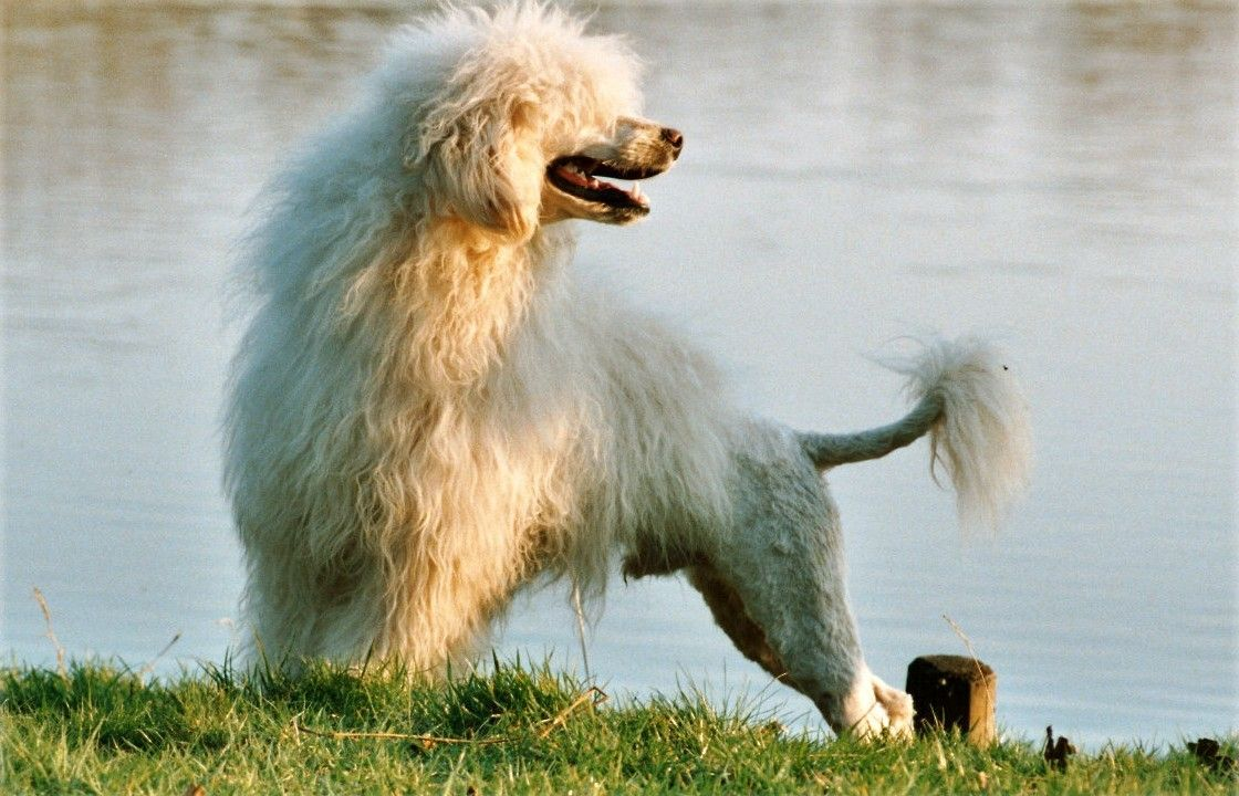 Cão_de_agua_Português type: gewelltes Langhaar